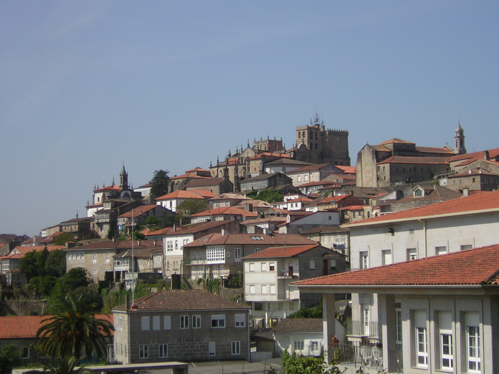 Fotografía tomada dende a alameda de Tui. Galicia. Category:Galicia Publish by= Albert galiza (Wikipedia galega), user:Lmbuga